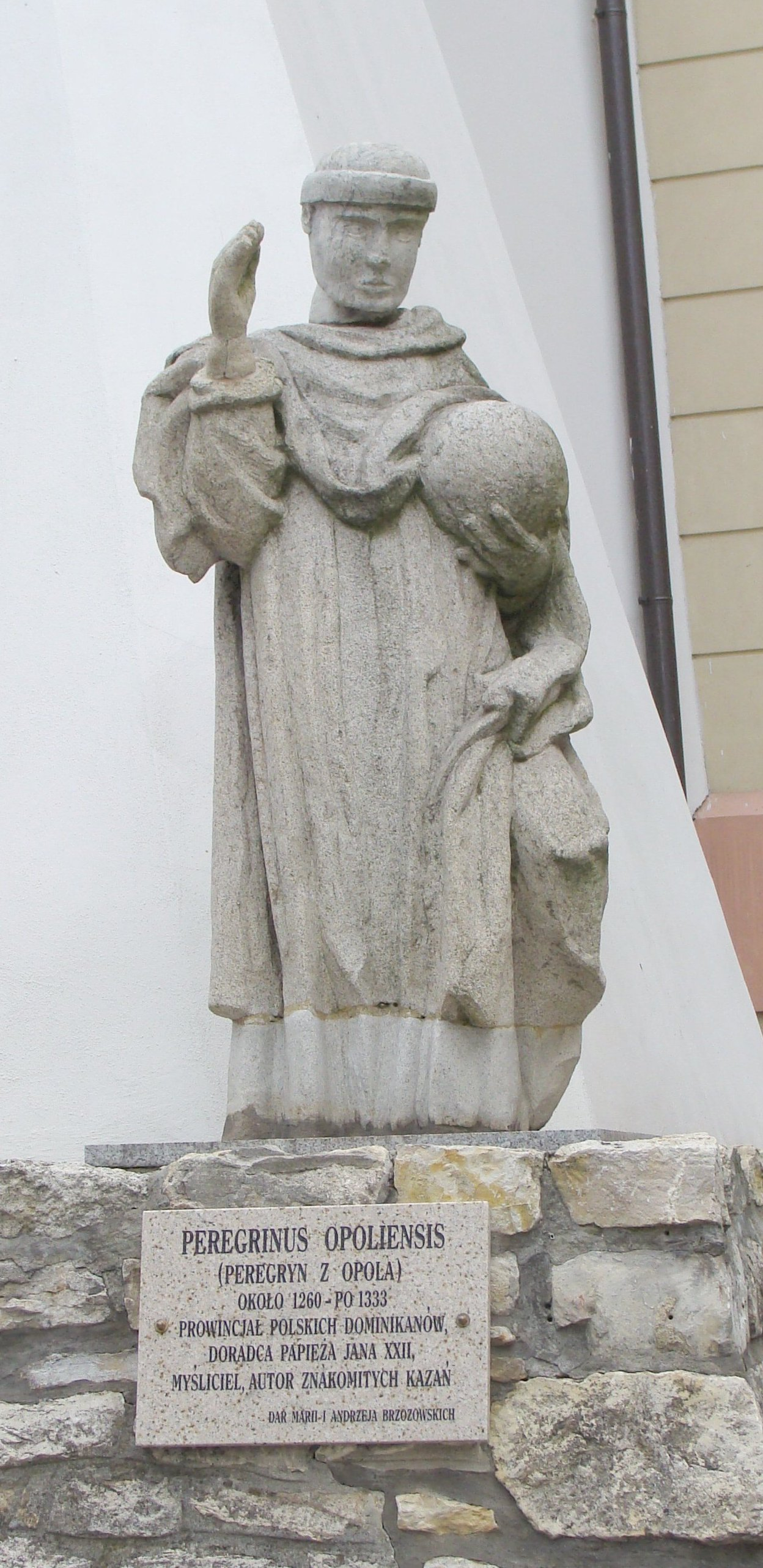 Peregrynus Opoliensis obok budynku Rektoratu UO w Opolu